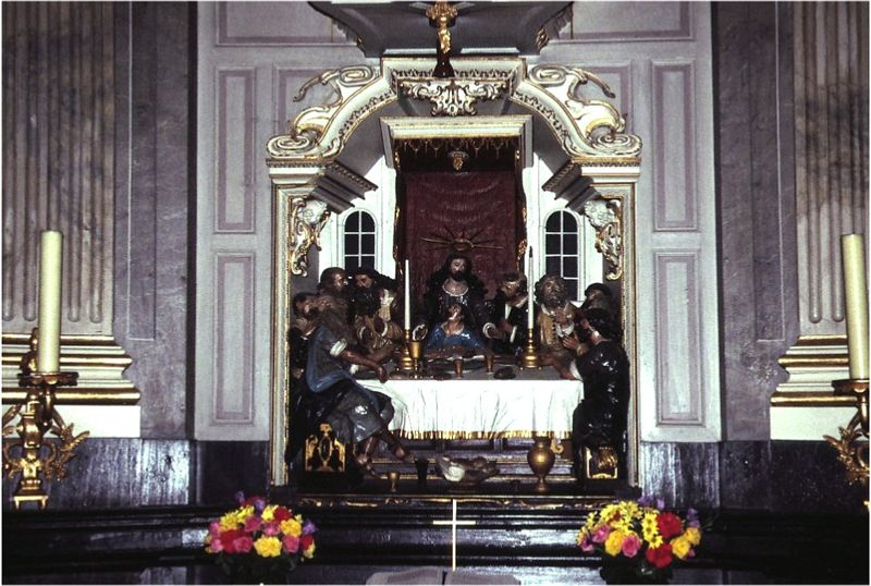 Kappeln Kirke (Kappel) i Sydslesvig. Alterparti